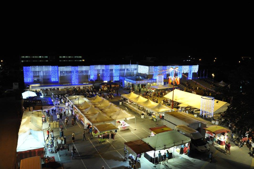 La salle Saonexpo à Port-sur-Saône